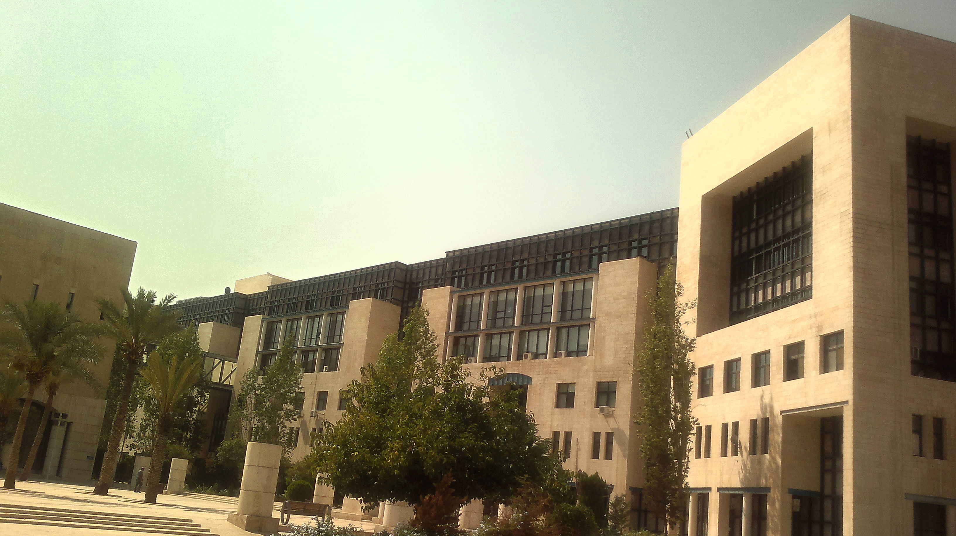 مبنى أمانة عمان الكبرى في راس العين، عمان